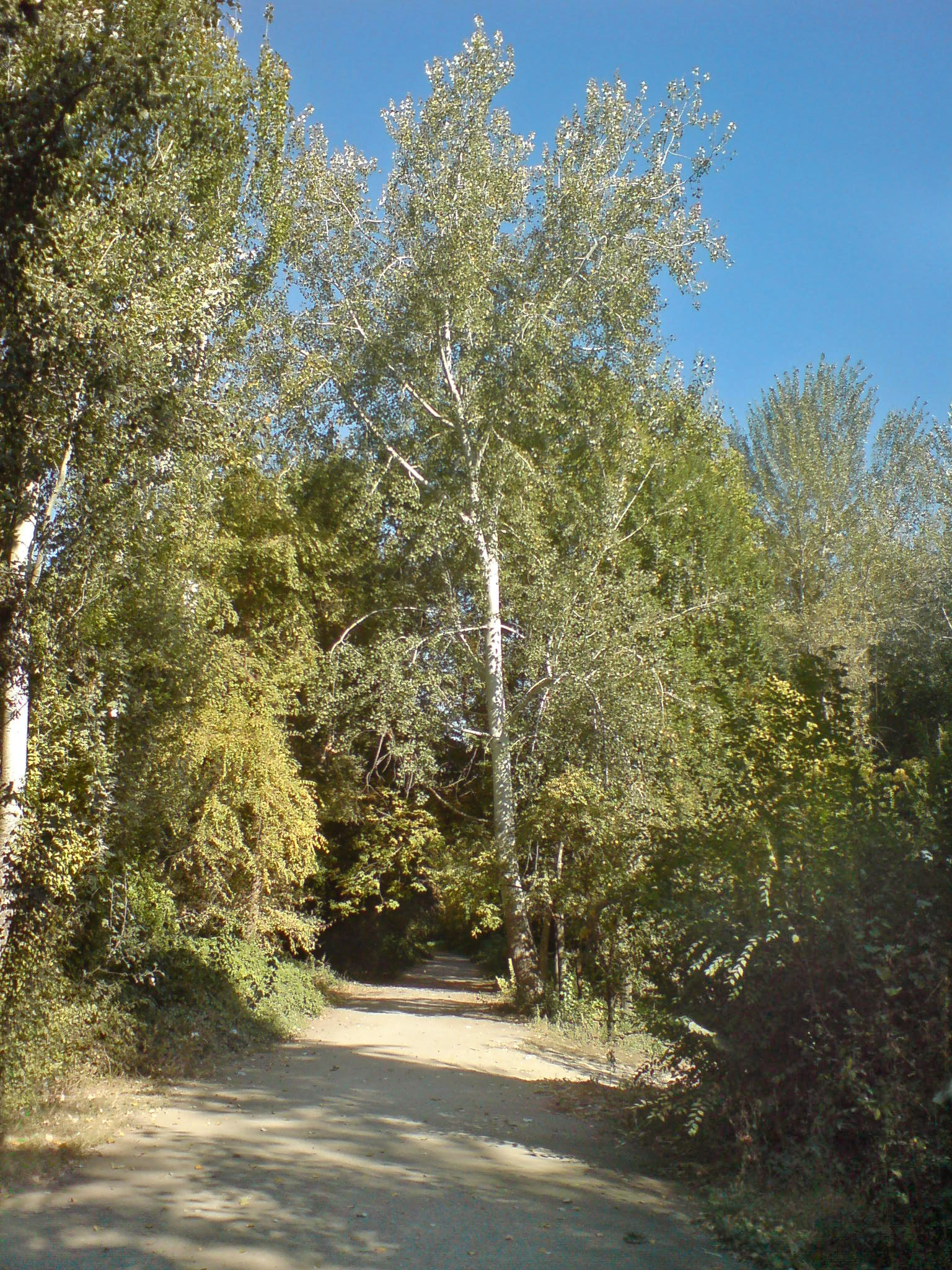 Ботанический сад Ташкента, среднеазиатская коллекция. Тополя